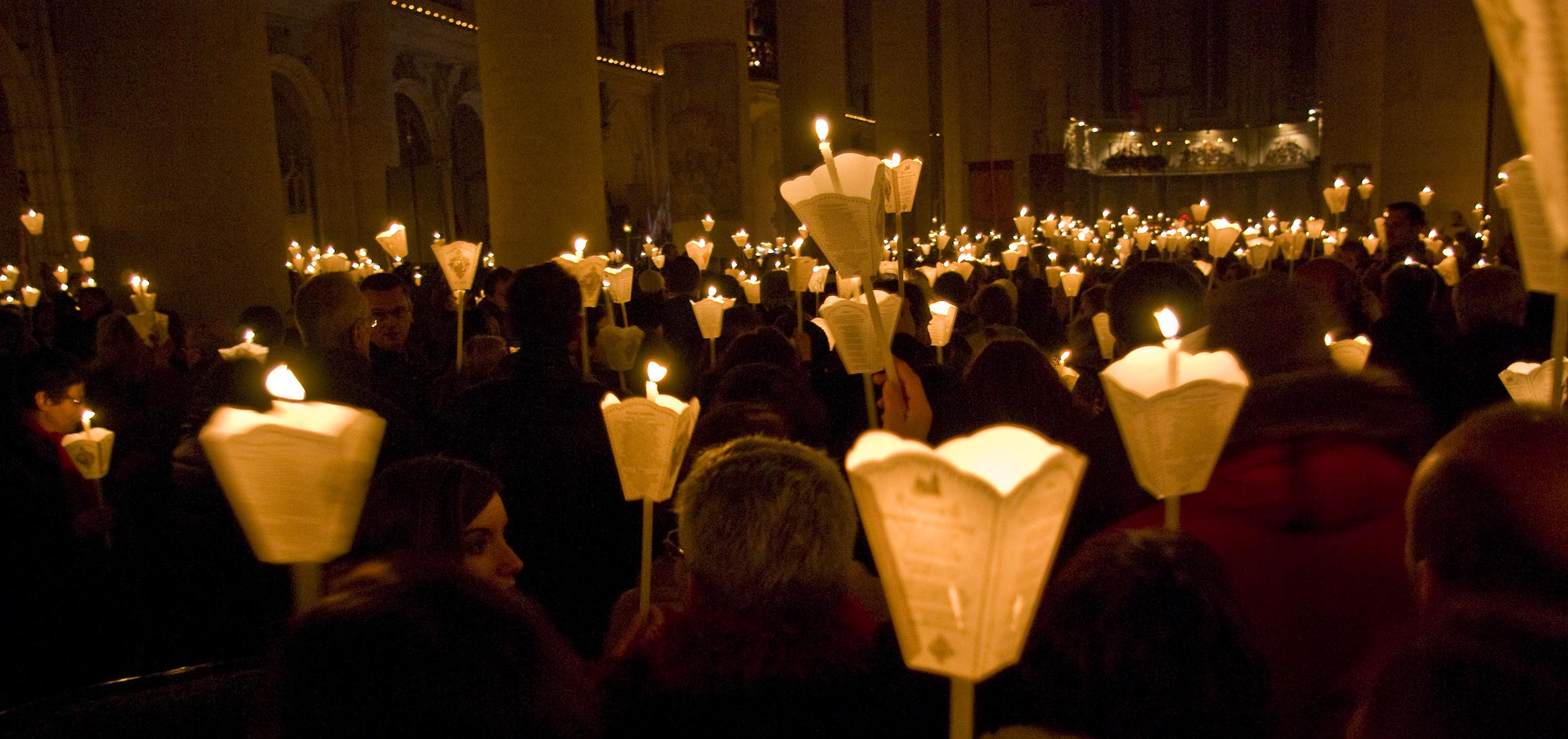 La procession de annuelle de Saint Nicolas en la basilique de Saint-Nicolas-de-Port